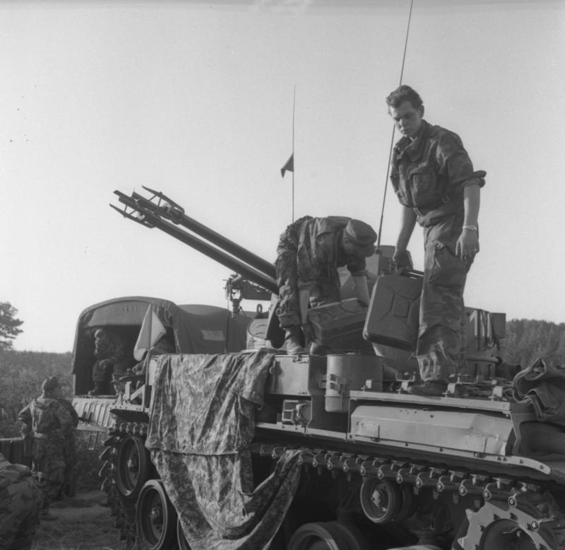 Herbstübung des Heeres: Fla-Panzer im Raum Altenkirchen-Hachenburg (Oberwesterwald)